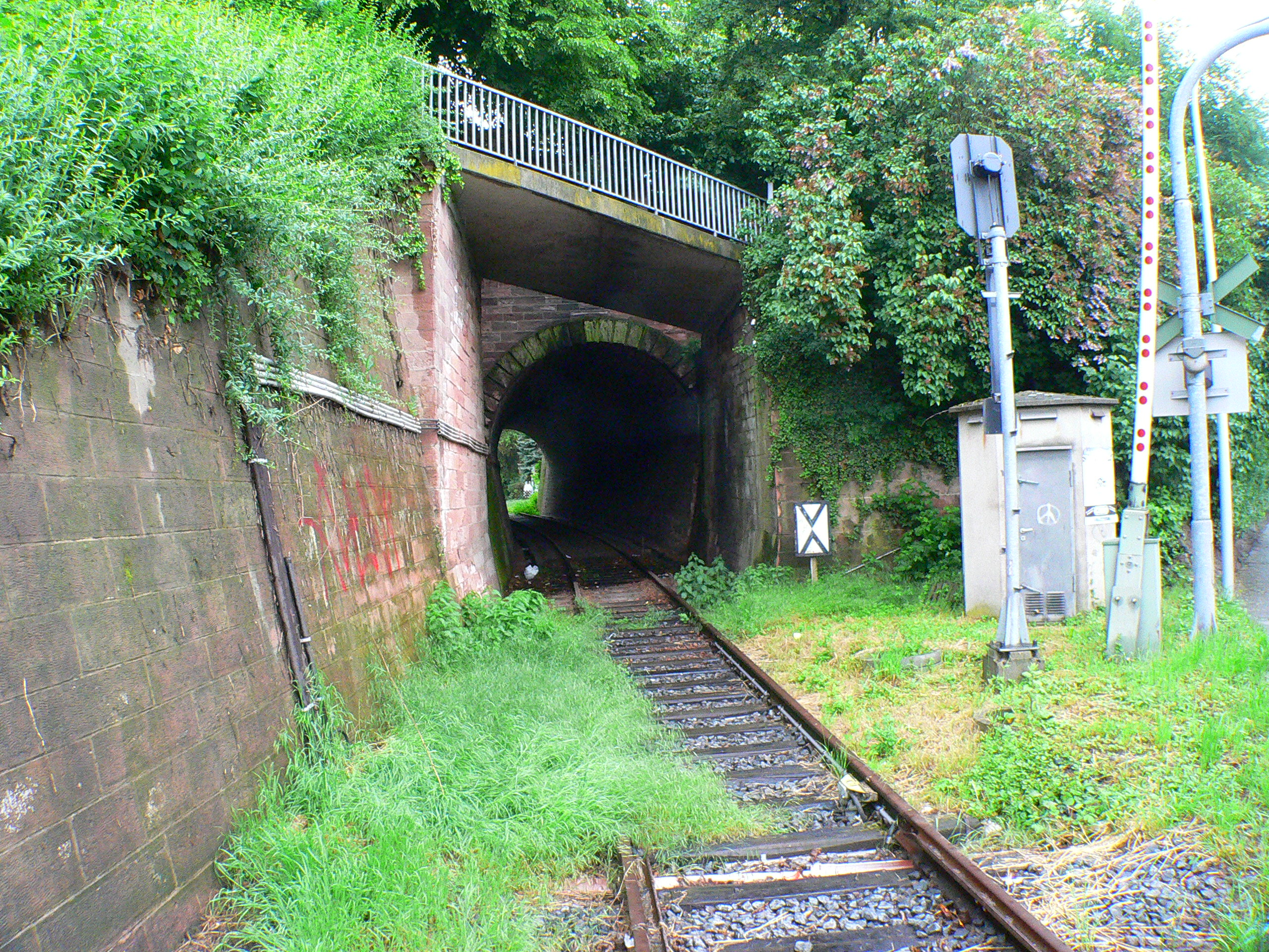 Gersprenztalbahn - Tunnel Reinheim, Südostportal